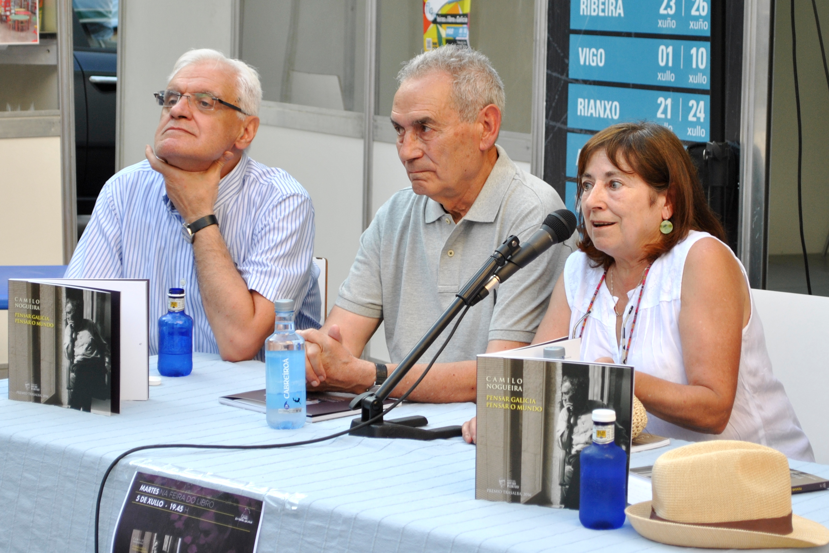 Presentación do libro Pensar Galicia, Pensar o mundo de Camilo Nogueira Román na Feira do Libro de Vigo 2016. Fotografía tirada ao aire libre na vía pública, na Porta do Sol de Vigo.